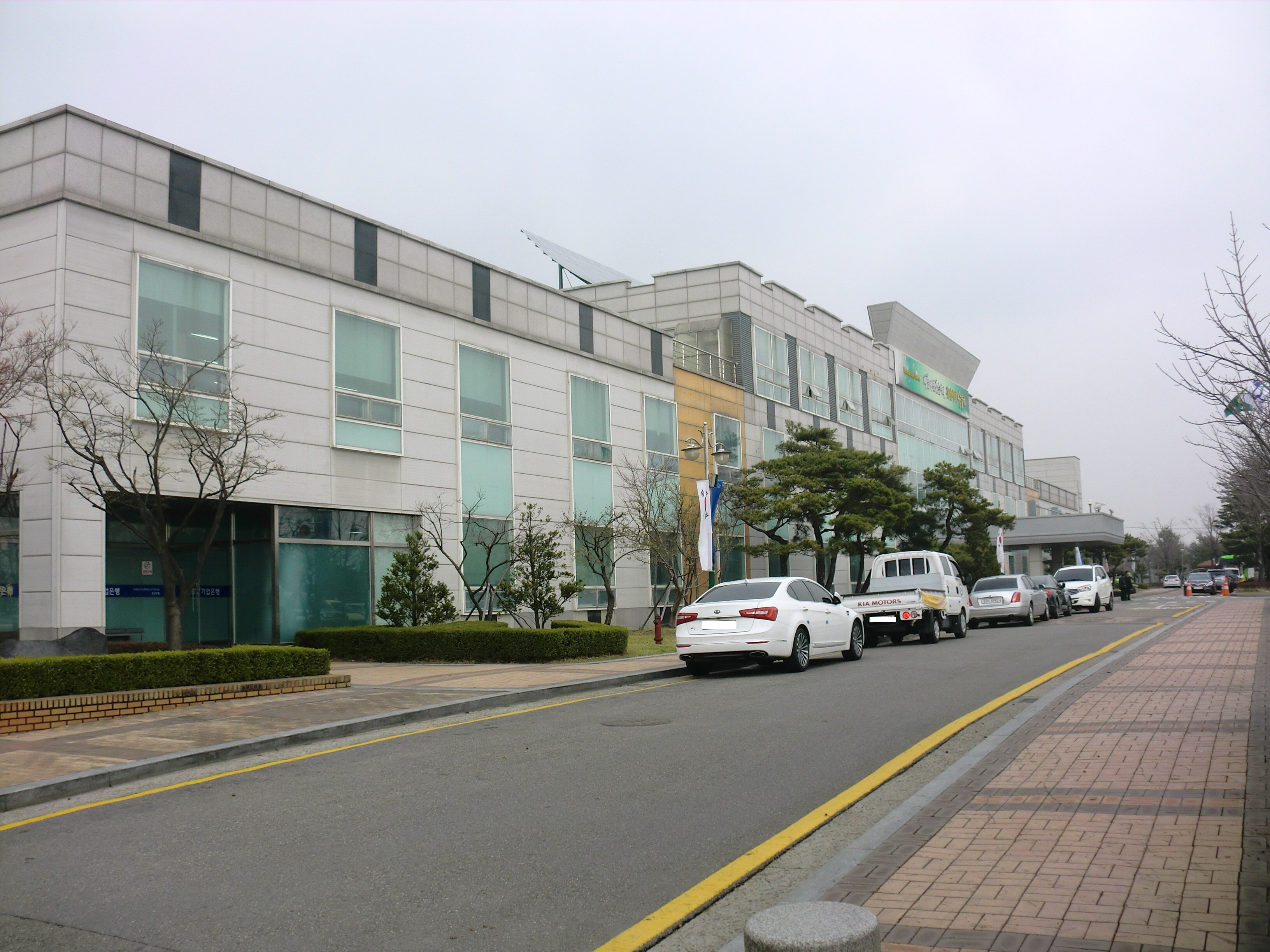 경기도 수원시에 있는 권선구청